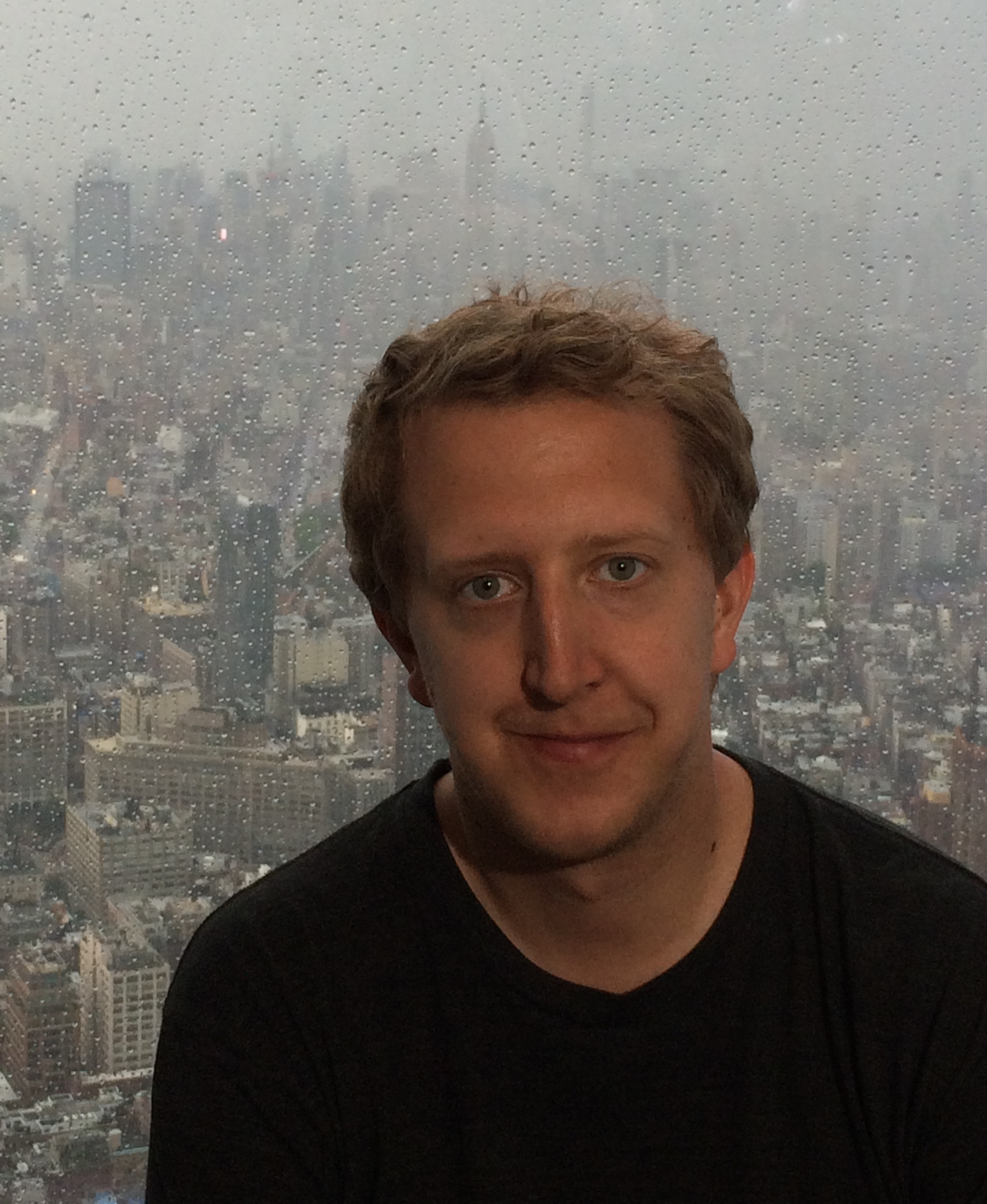 Norwegian comedian Magnus Devold